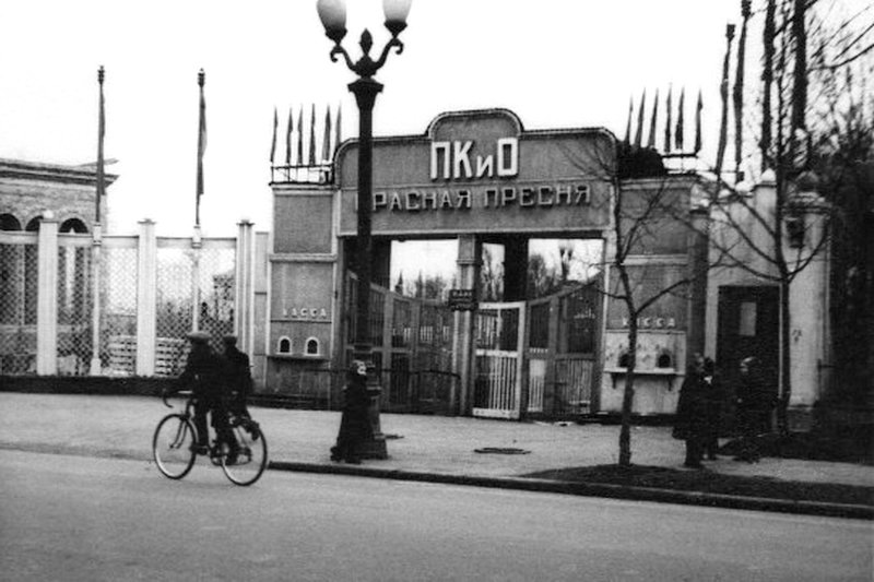 Главный вход в парк «Красная пресня»